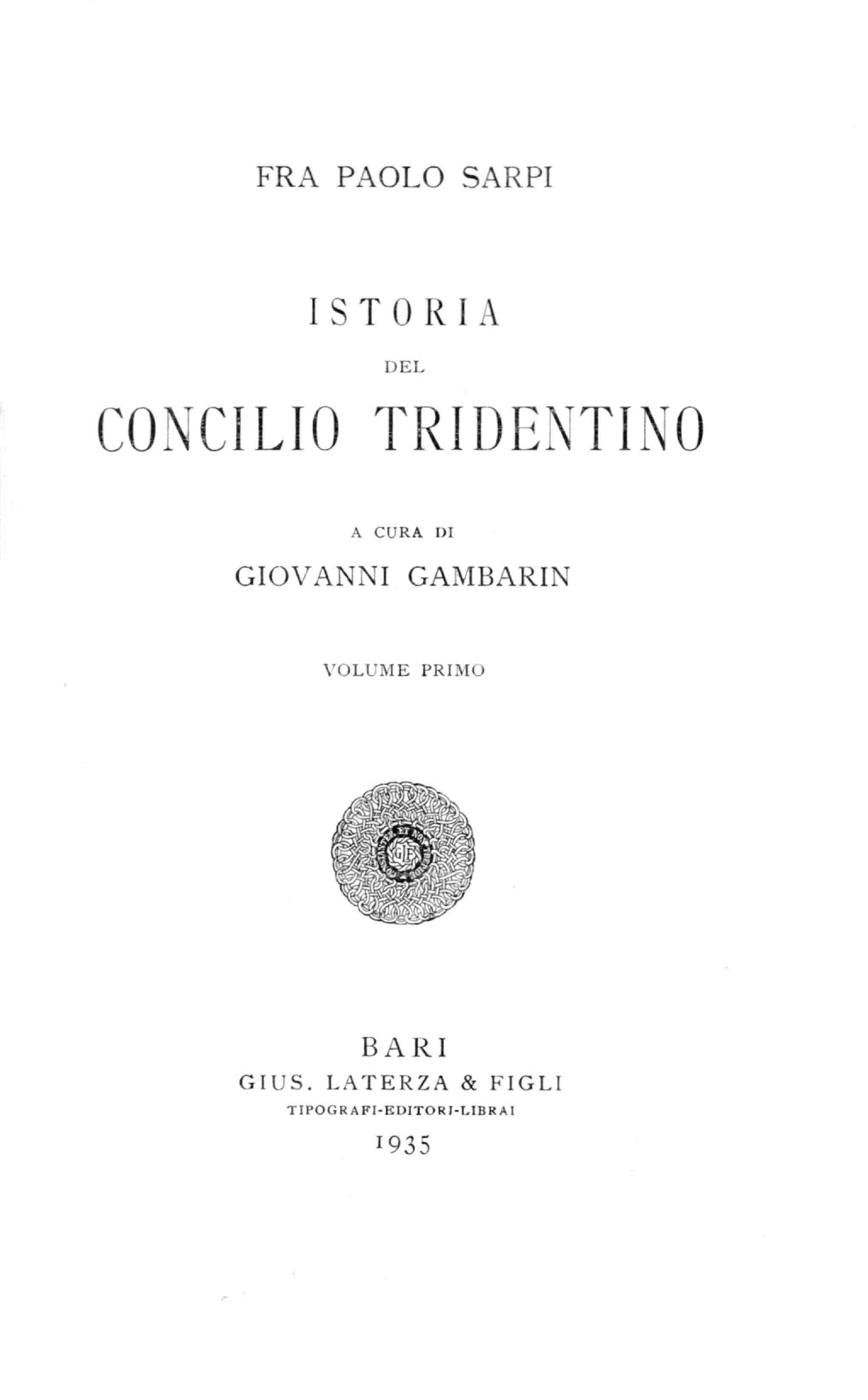 Istoria del Concilio tridentino. 1 / Fra Paolo Sarpi ; a cura di Giovanni Gambarin. - Bari : Laterza, 1935. - 439 p. ; 22 cm. - (Scrittori d'Italia ; 151) .